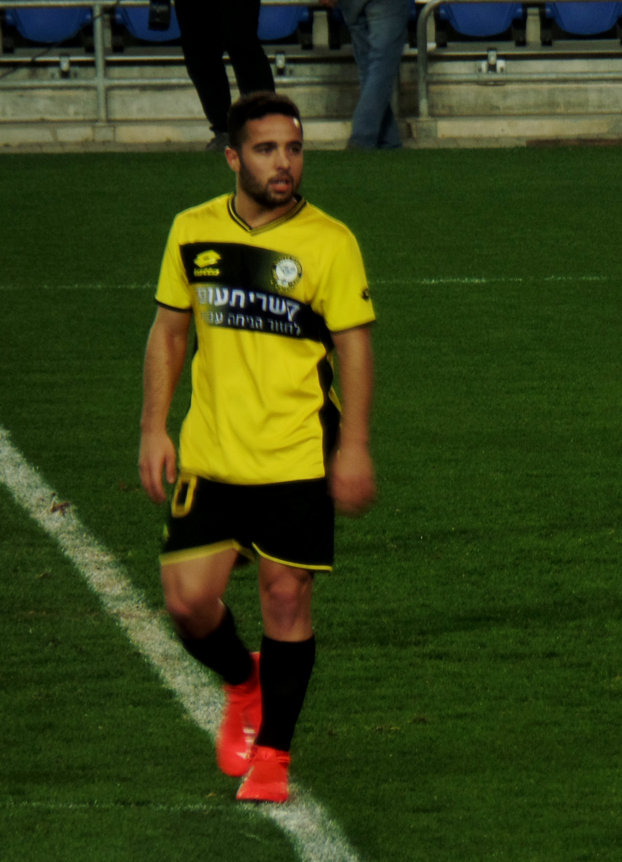 מוטי ברשבצקי במדי מכבי נתניה, 2019